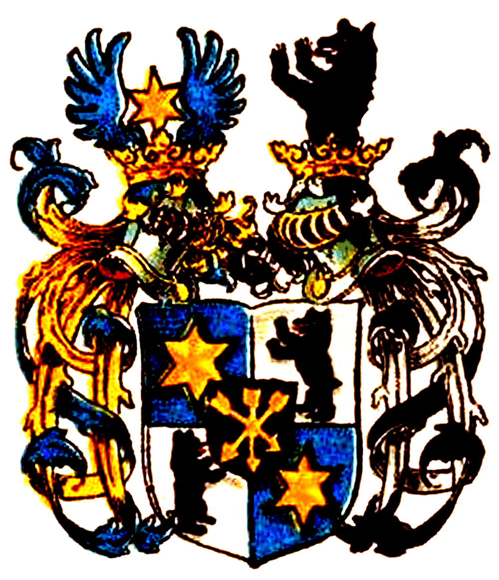 Wappen derer von Zschok